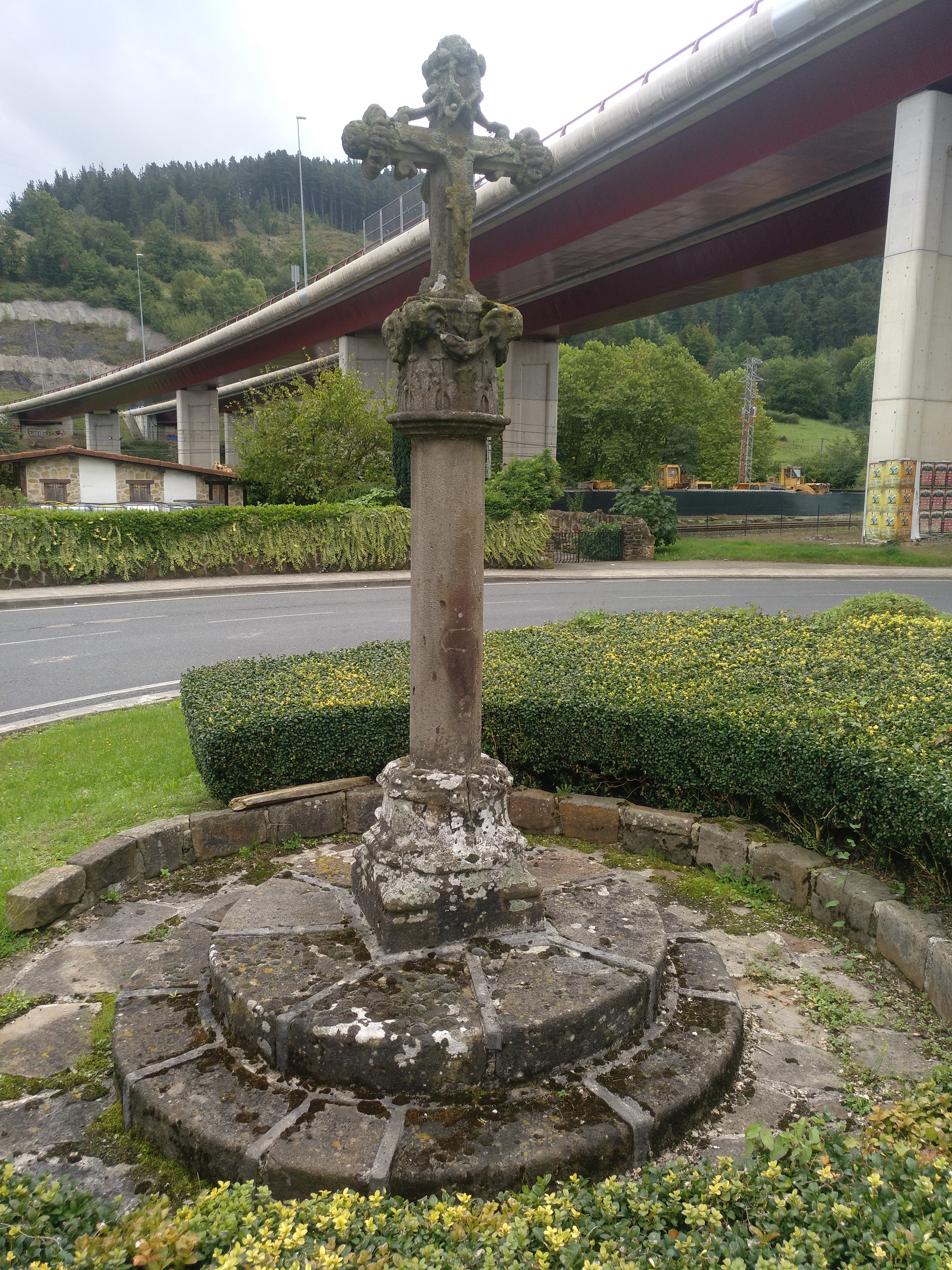 Mendiarazko gurutzea